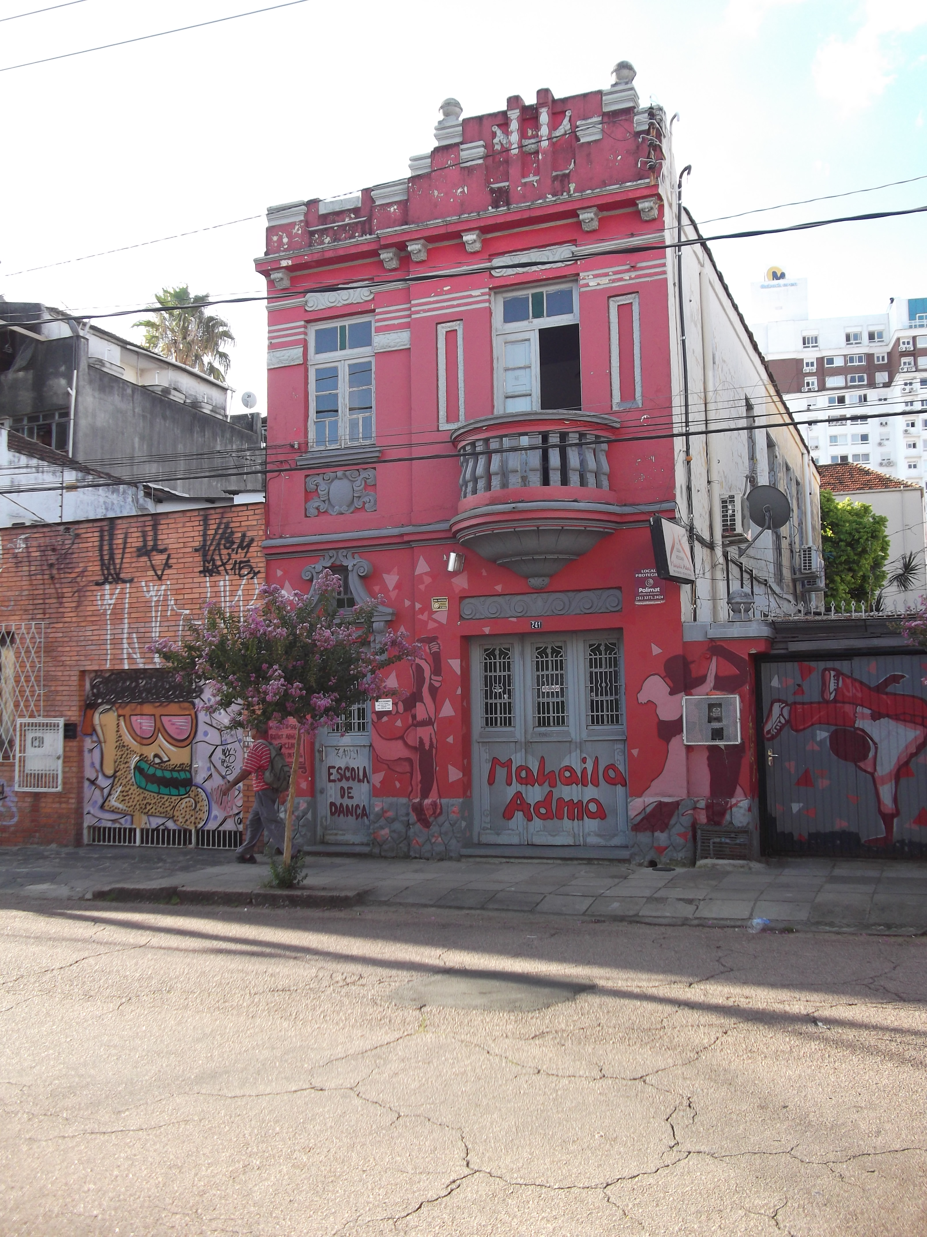 Rua Lopo Gonçalves n. 241, Porto Alegre, Brasil